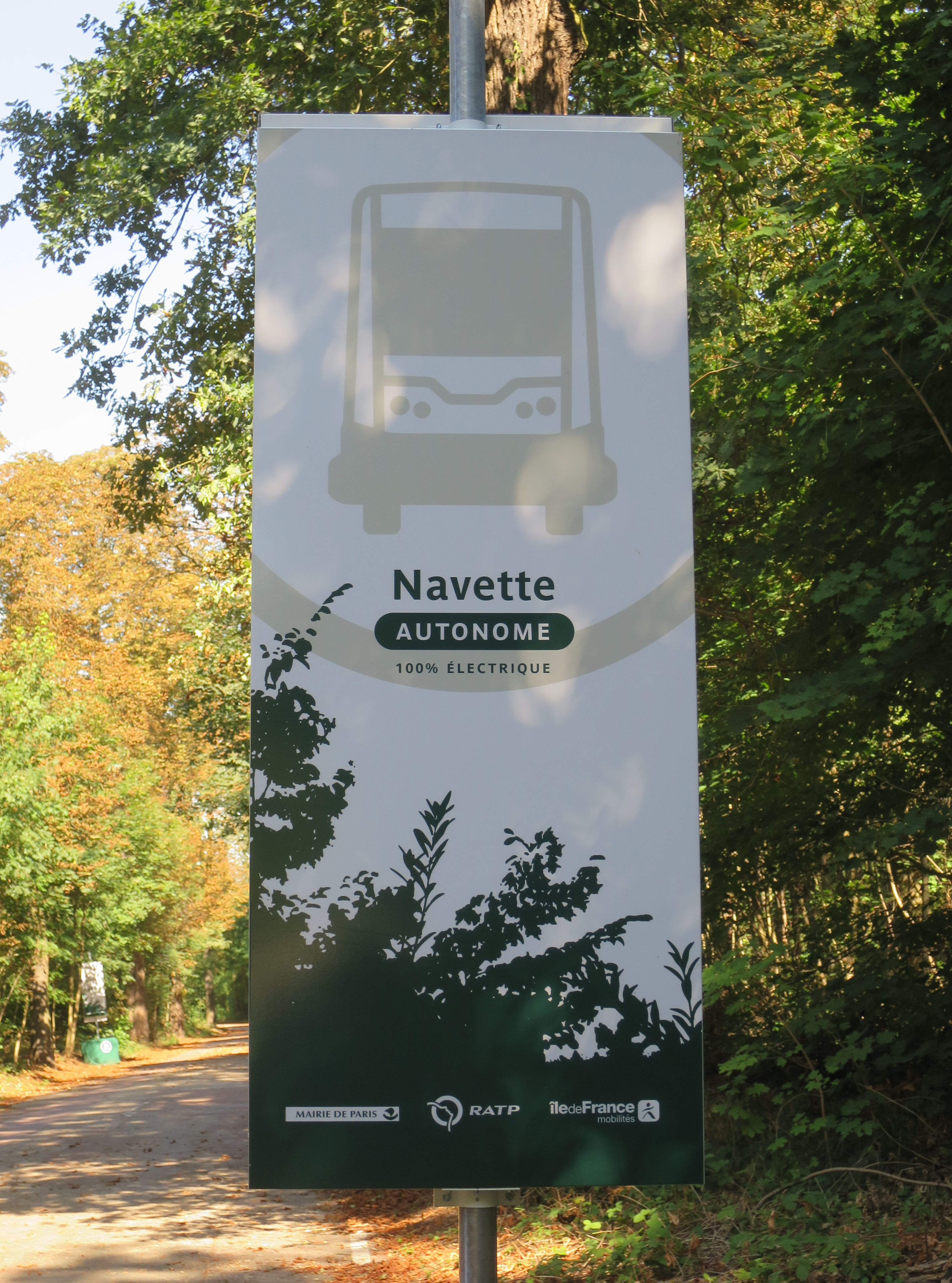 Haltestelle des Navette autonome der RATP im Bois de Vincennes